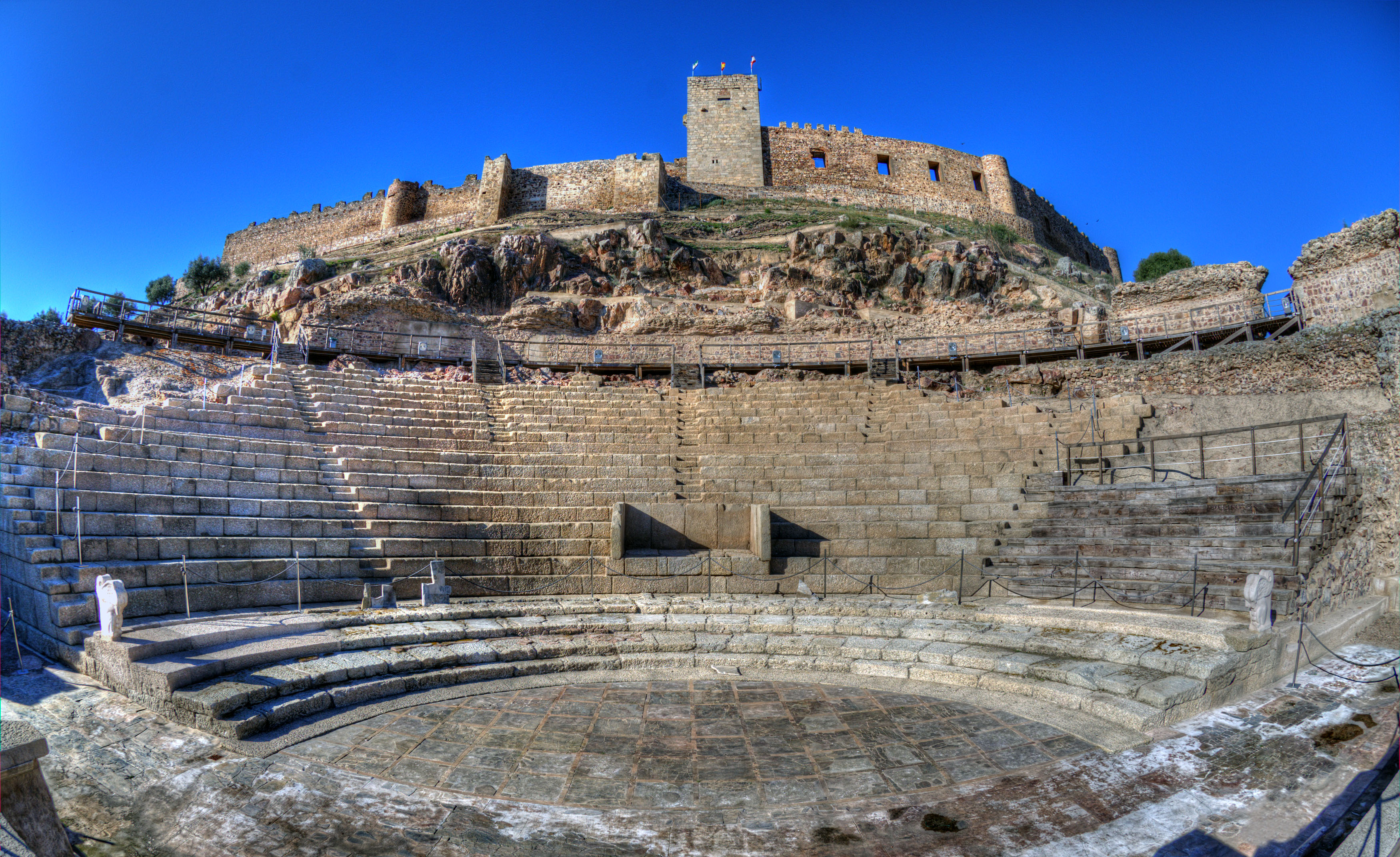 El teatro de Medellín está en la ladera del cerro del castillo y conserva de forma excepcional cavea y orchestra.